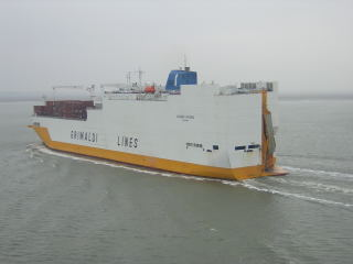 zelf gemaakt Categorie:Afbeelding schip